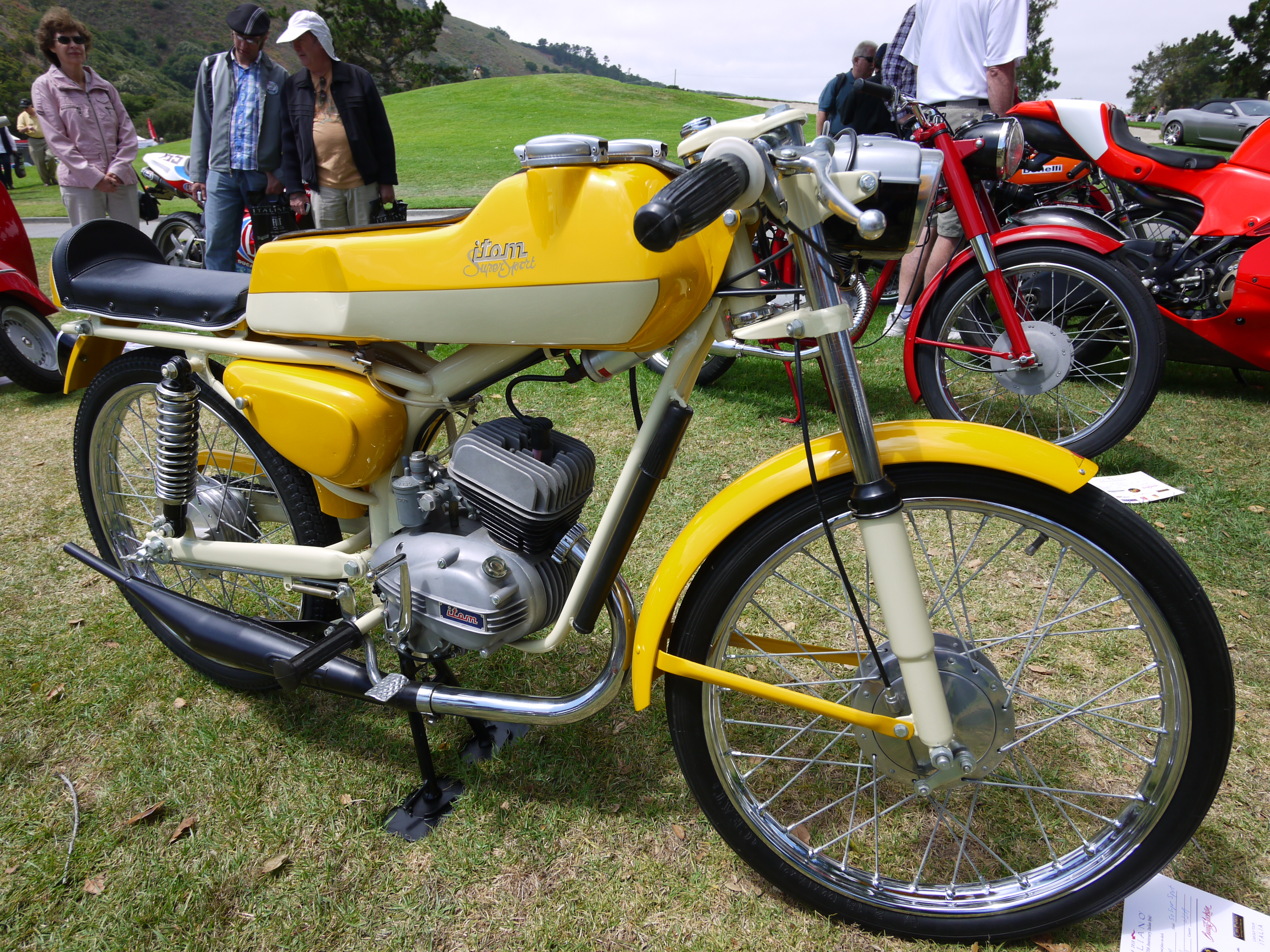 Itom Astor 50 Super Sport 4M Export del 1965, cambio a pedale, con alcune parti non originali. In particolare il gruppo termico appartenente al modello 1970, sospensioni e serbatoio.